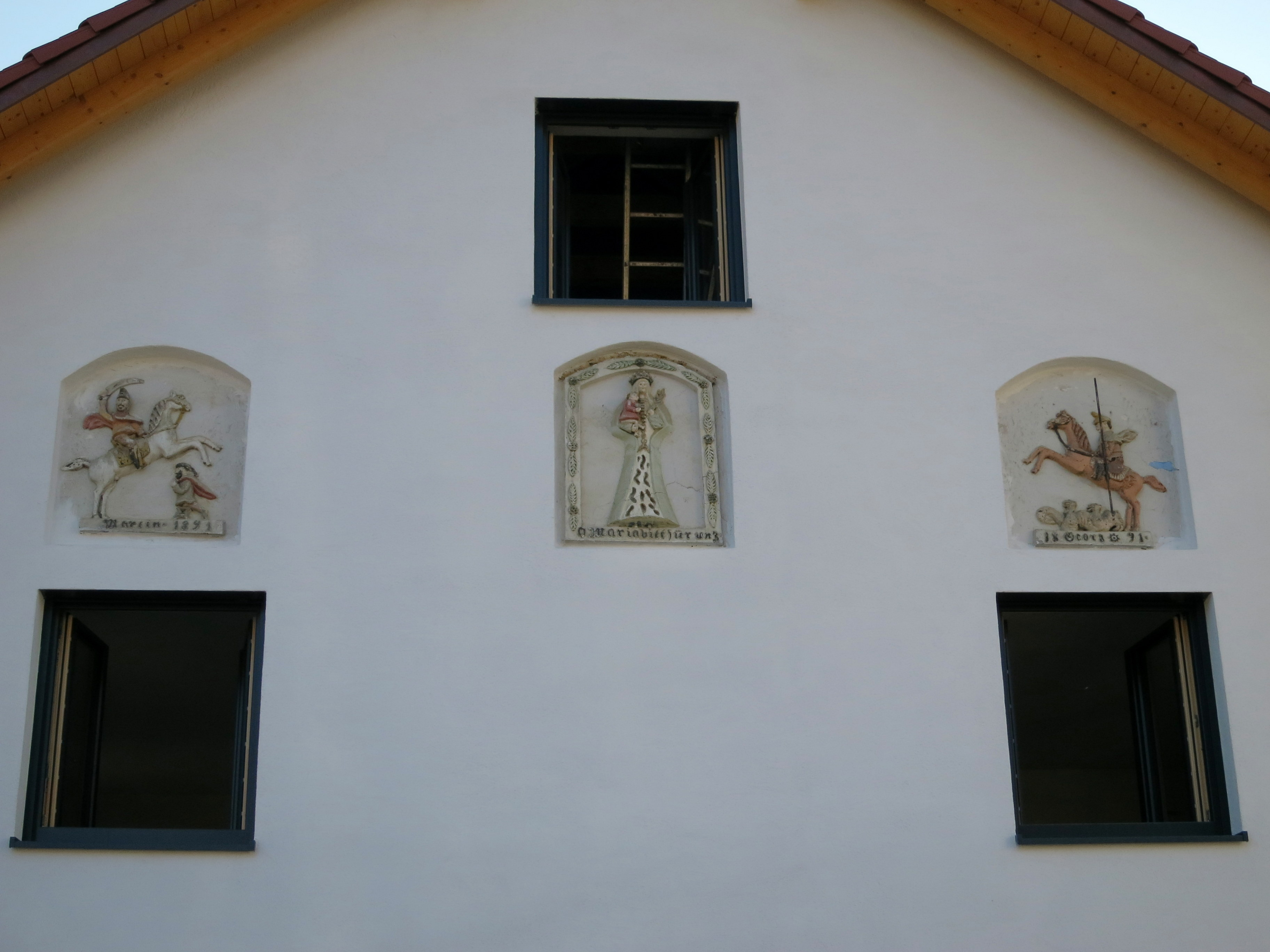 Drei Mörtelplastiken in der Atterstraße, auch am renovierten Haus erhalten